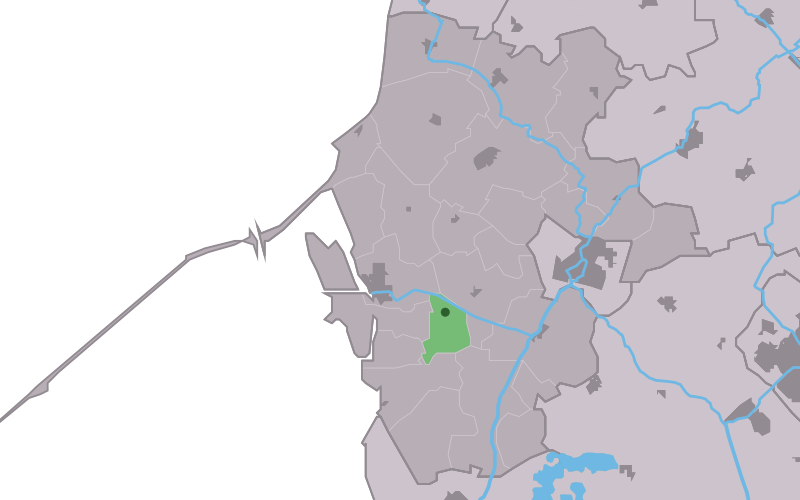 Kaartsje fan himrik fan Allingawier